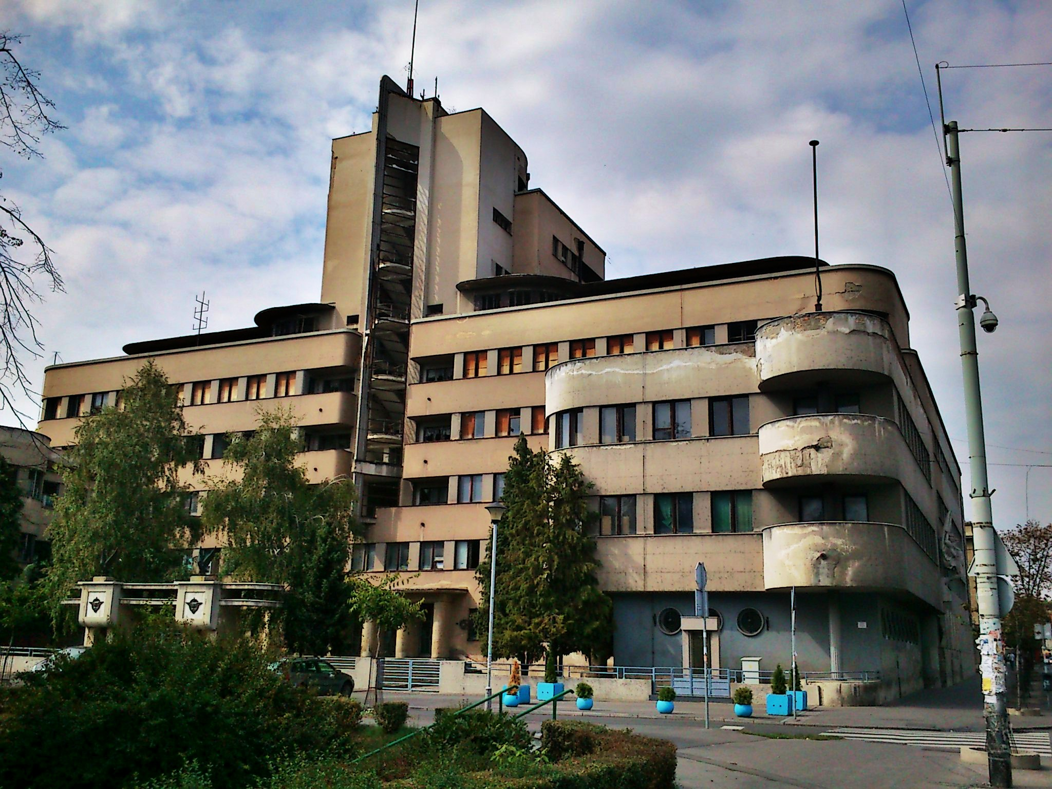 Зграда команде ваздухопловства